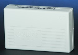 Identificador usado na Via Verde em Portugal